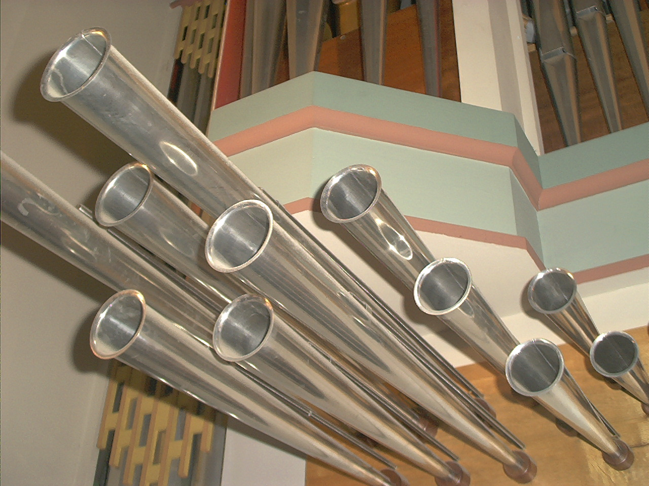 Spanische Trompete (Orgel)